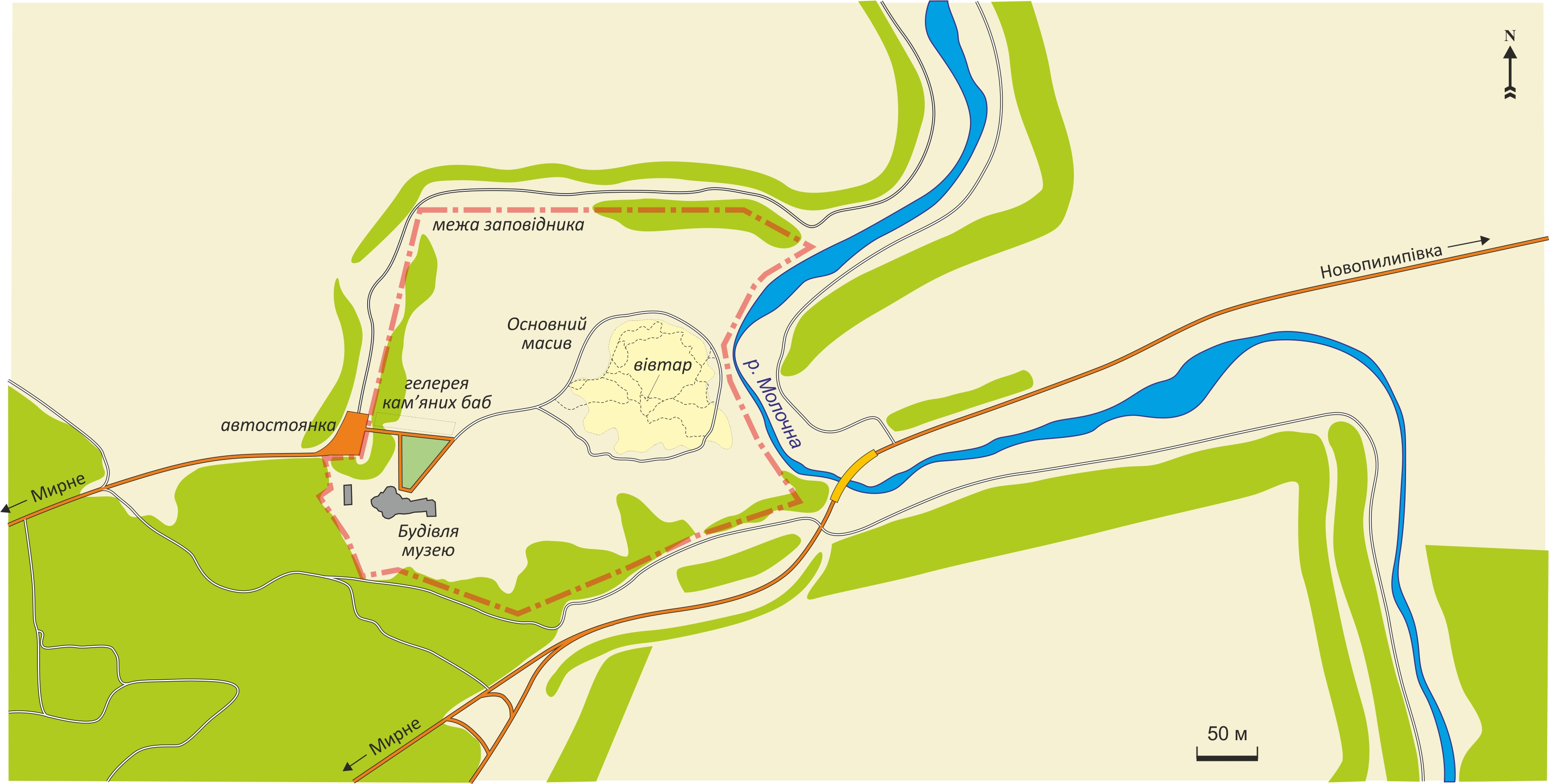 схема заповідника Камяна могила